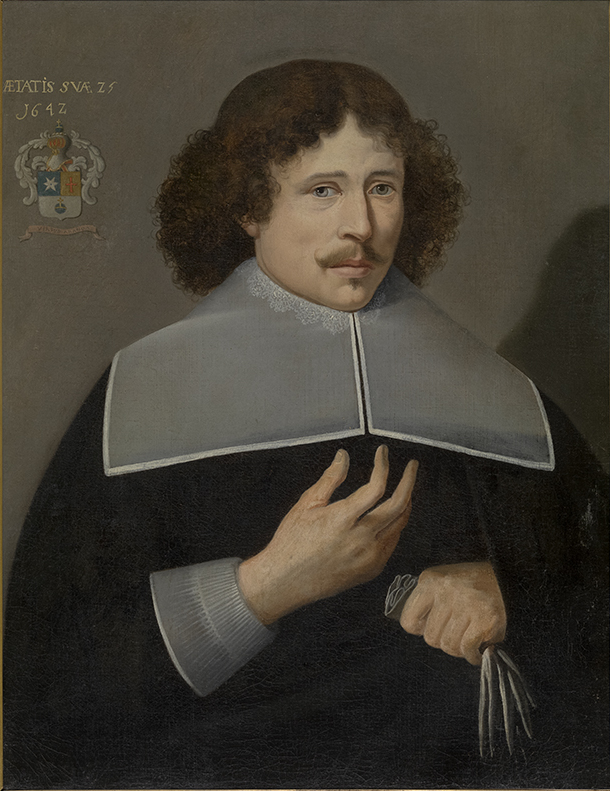 Portret van Emmanuel de Aranda (Anonieme meester, Brugge?, 1642, 1642); collection: Musea Brugge - Groeningemuseum